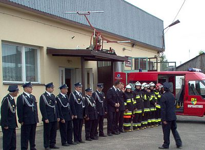 Zbiórka części drużyny Osp w Bartnikach